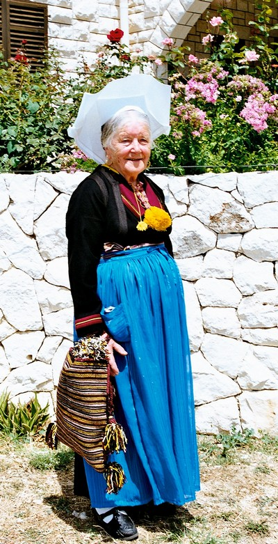 Konavle narodna nošnja